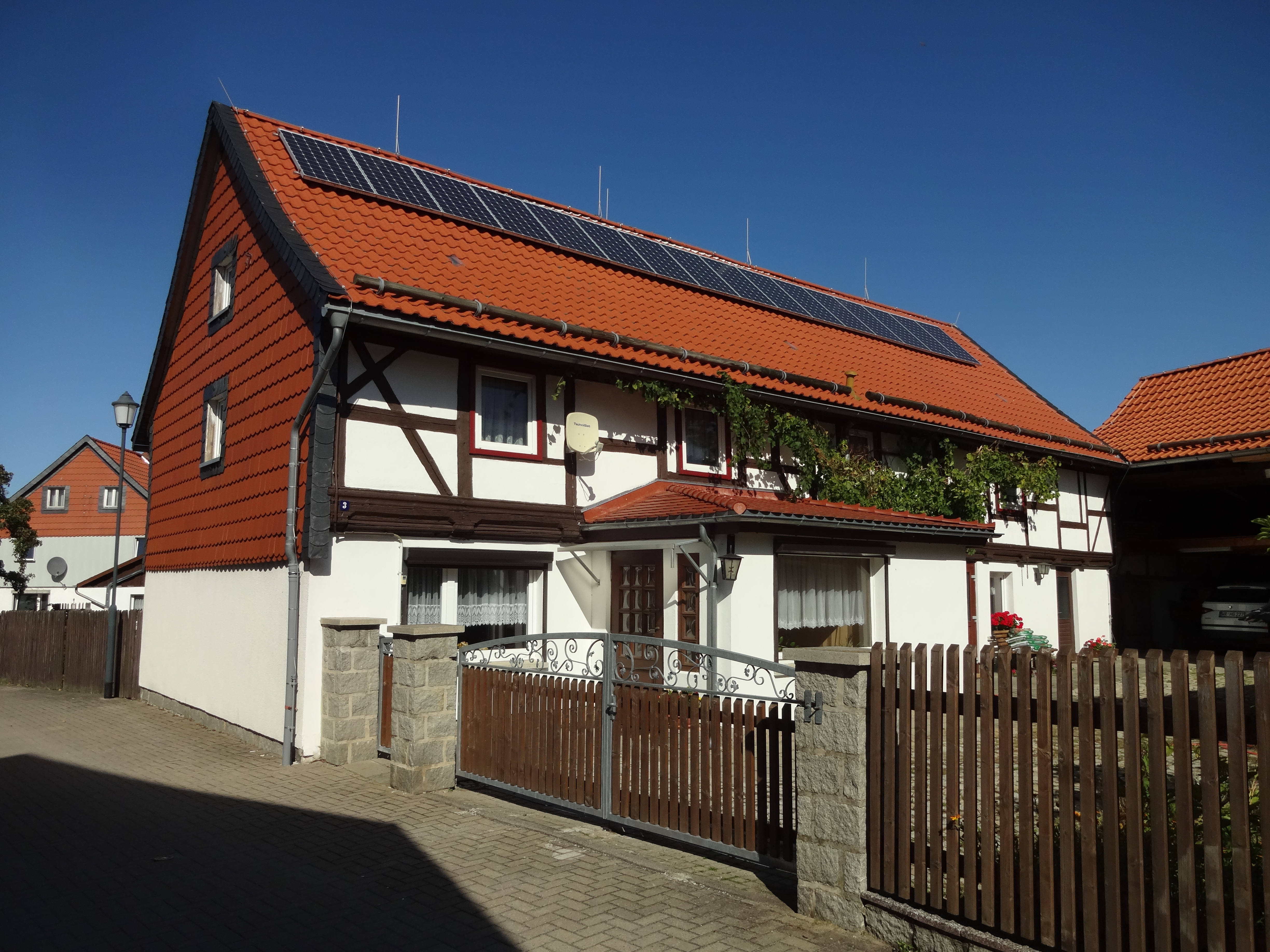 denkmalgeschütztes Wohnhaus in der Schulstraße 3 in Drübeck